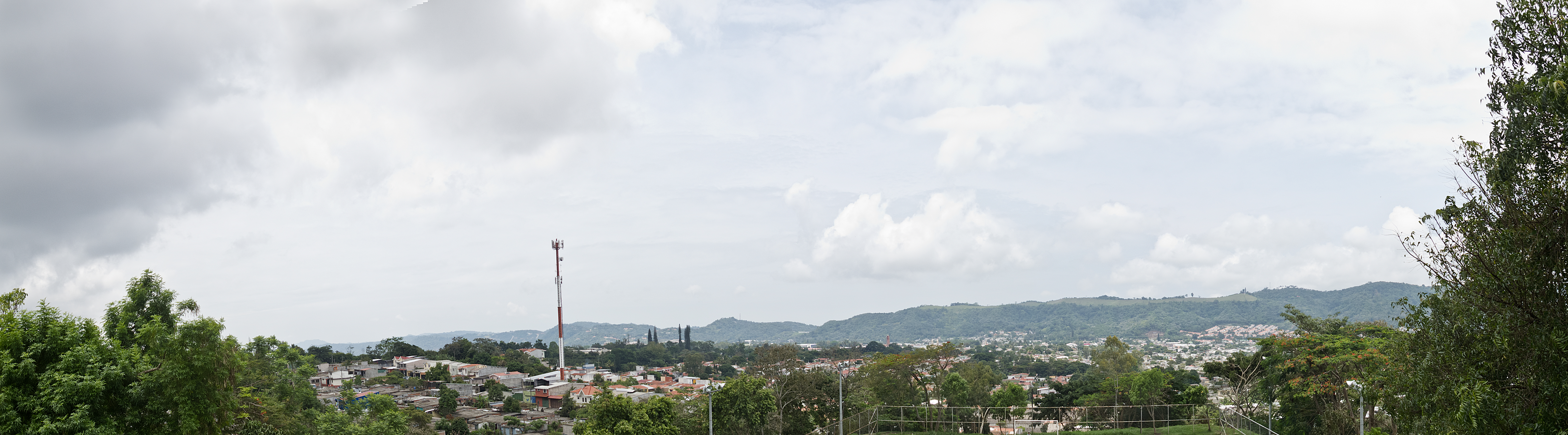 Vista (Panorama) de Santa Tecla desde el Parque Ecologico San José